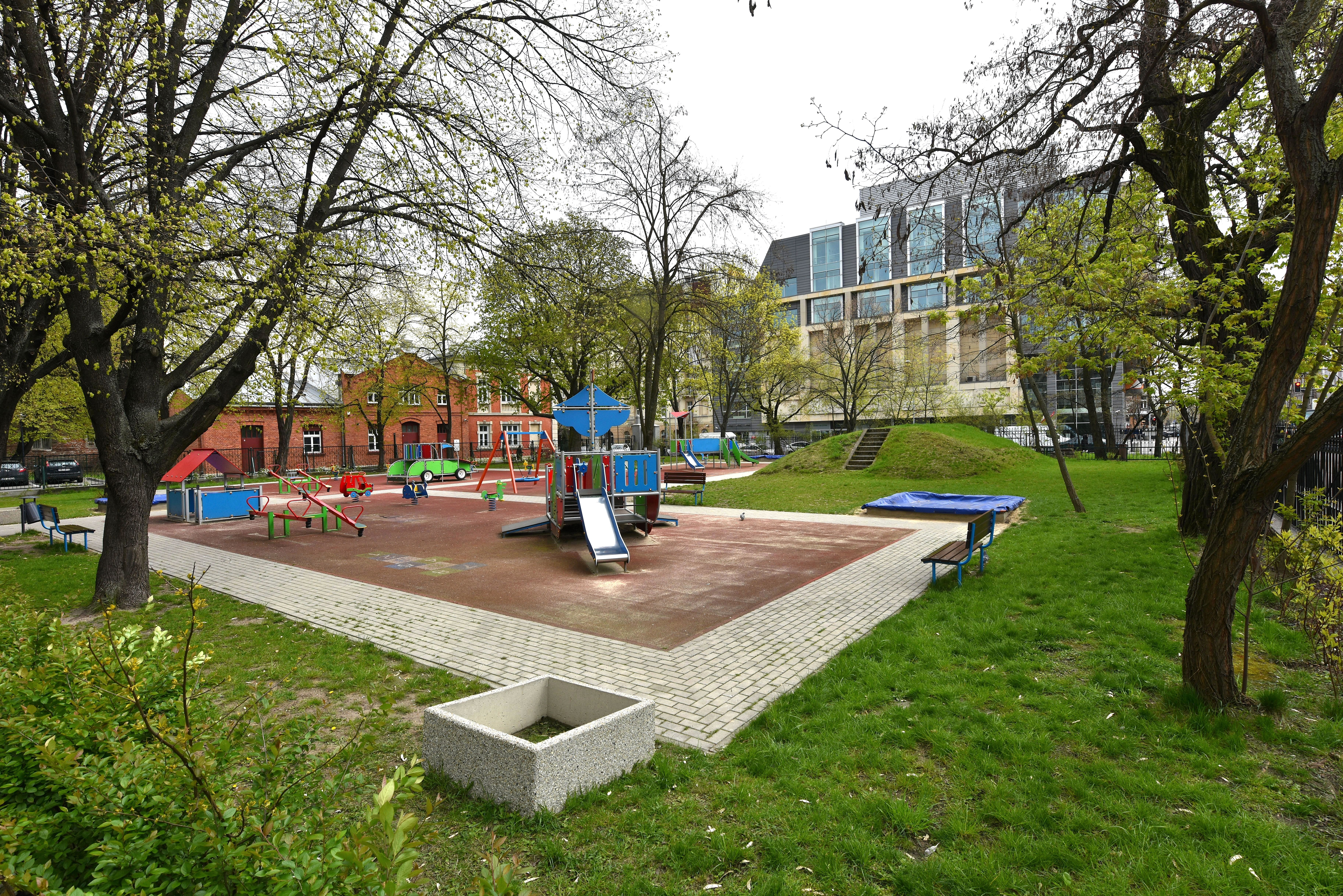 Miejsce, w którym znajdowała się Synagoga Praska. Obecnie ogród przedszkola nr 183